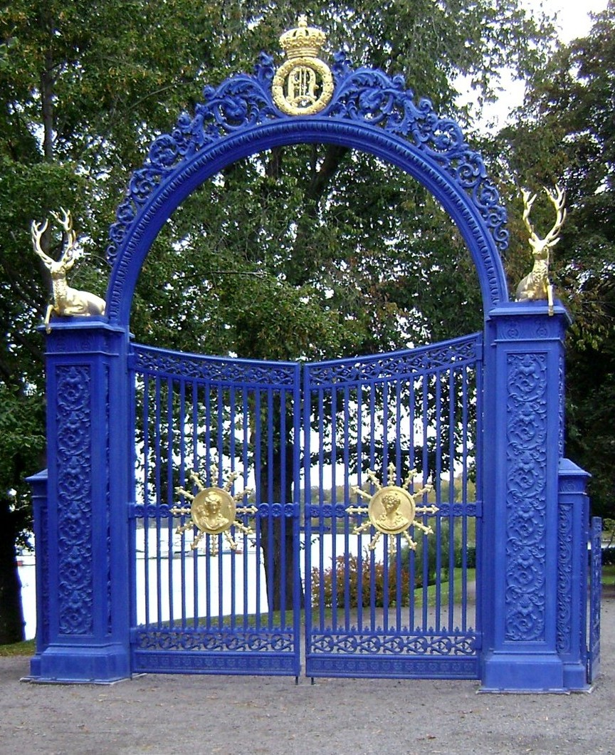 Blå Porten på Djurgården i Stockholm (beskärning)